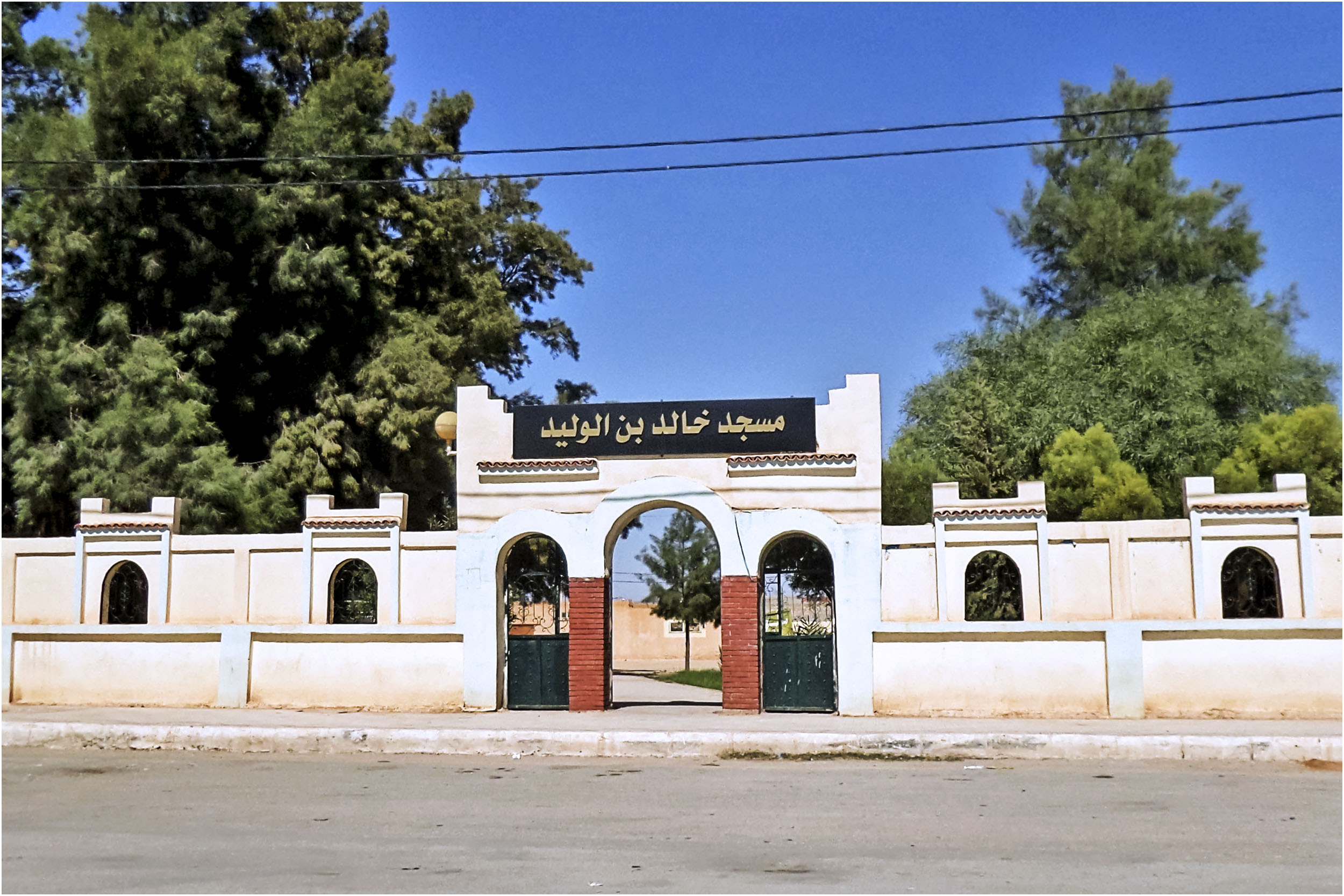 Sidi Makhlouf مسجد خالد بن الوليد